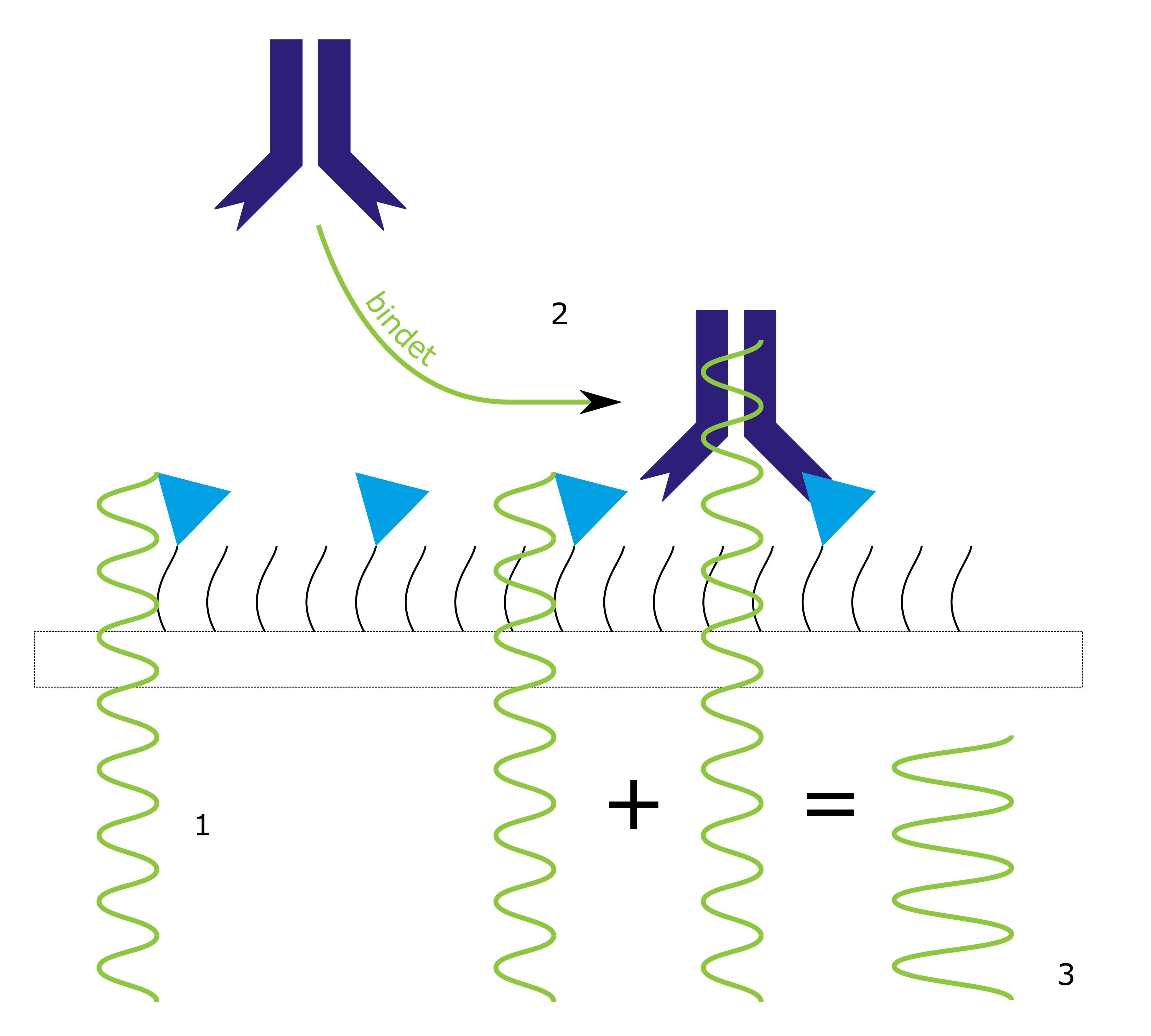 Änderung der Reflektivität bei Anbindung eines Analyten